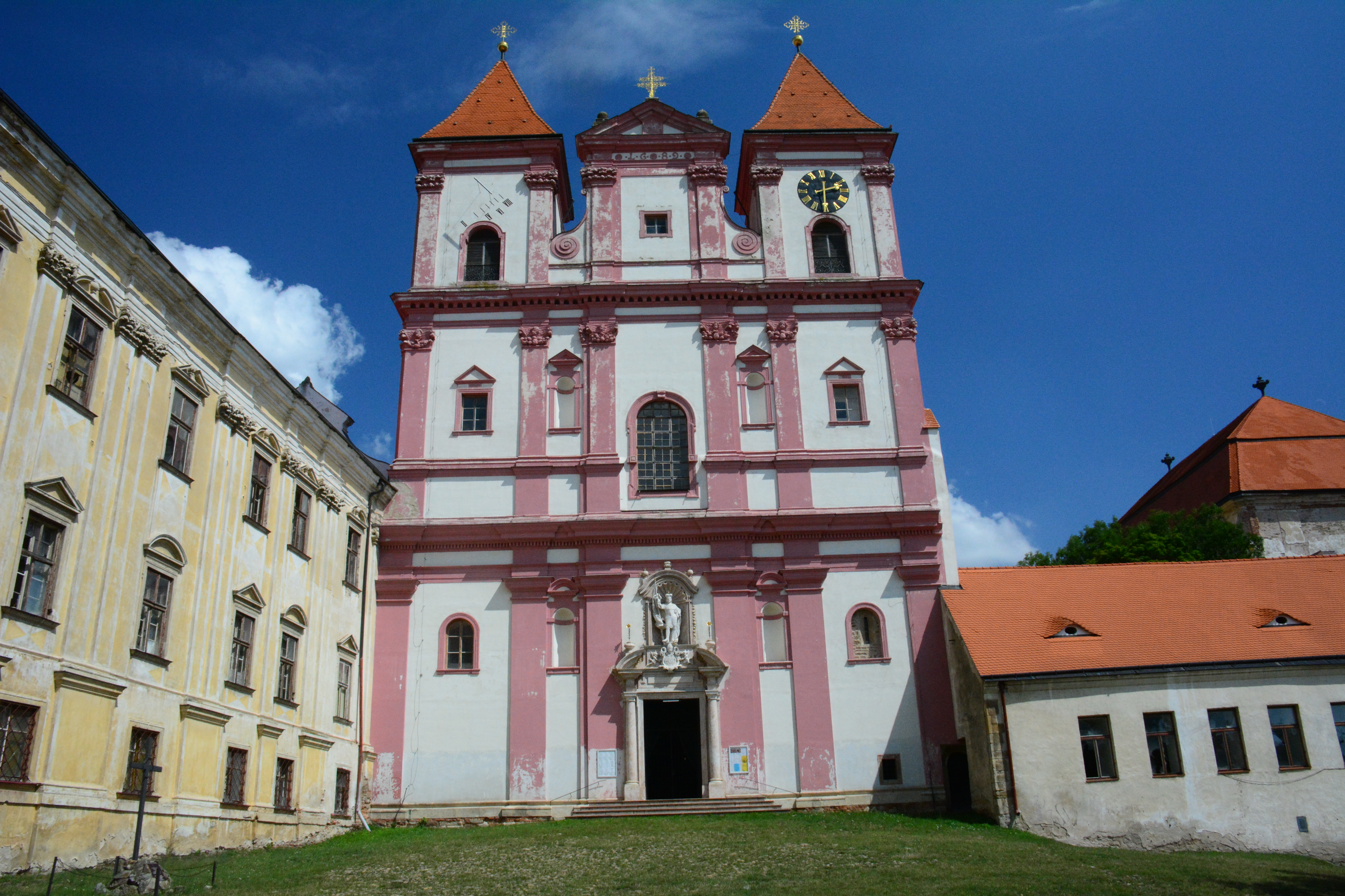 Die Klosterkirche von Louka / Klosterbruck